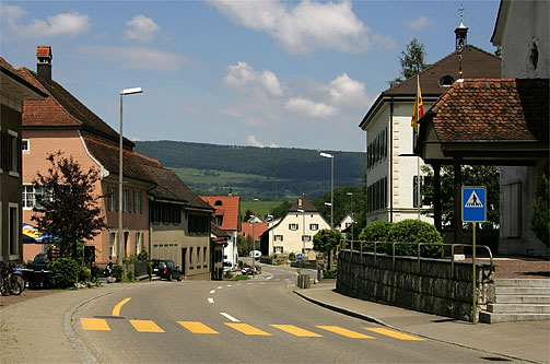 Brislach: Breitenbacherstrasse